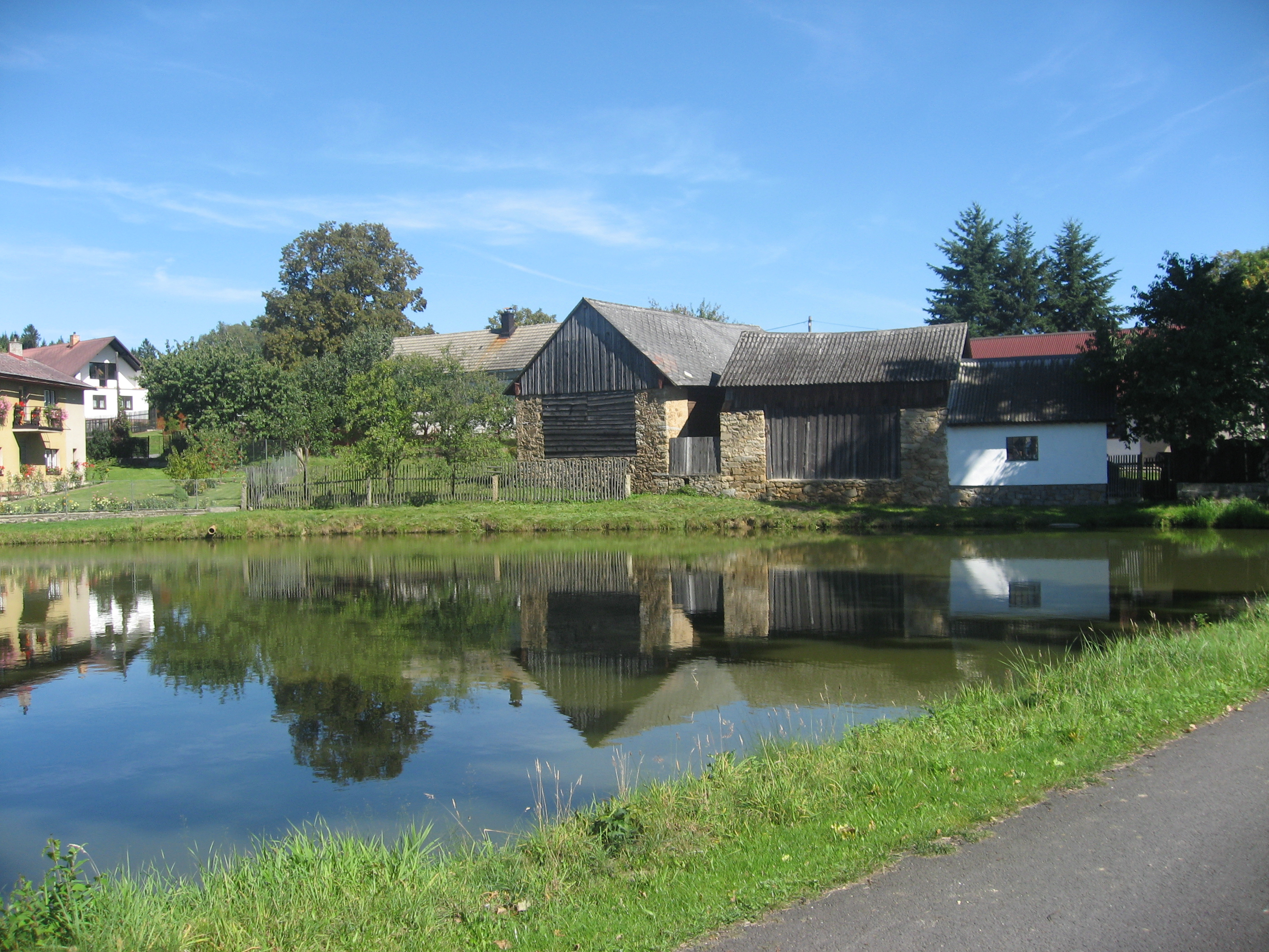 Horní Rápotice